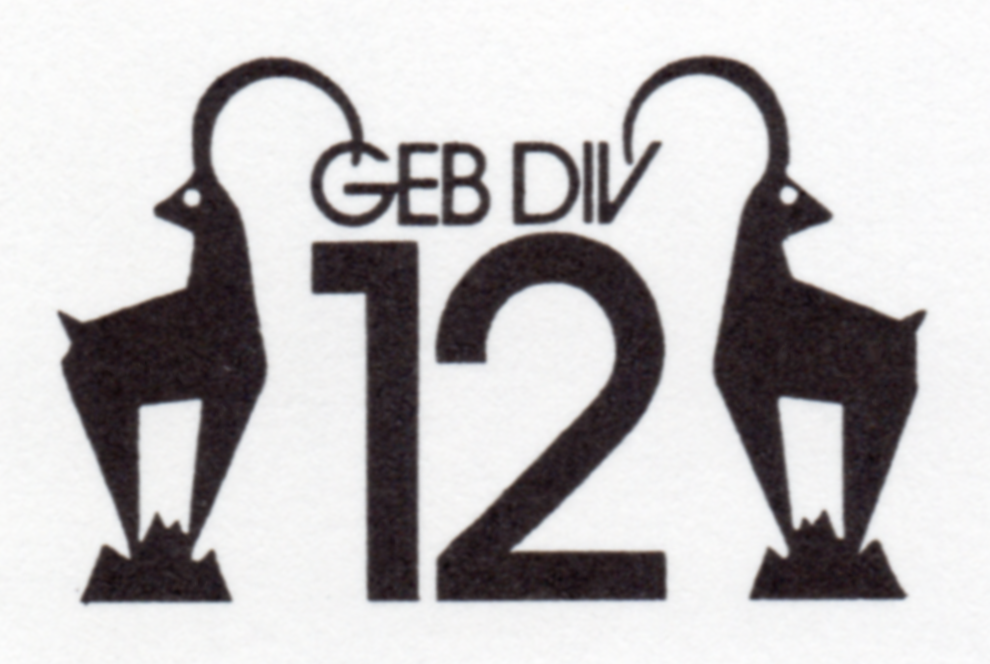 Logo der Gebirgsdivision 12 der Schweizer Armee, Schweiz